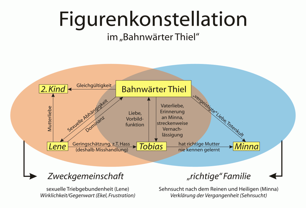 Figurenkonstellation bei Gerhart Hauptmanns „Bahnwärter Thiel“